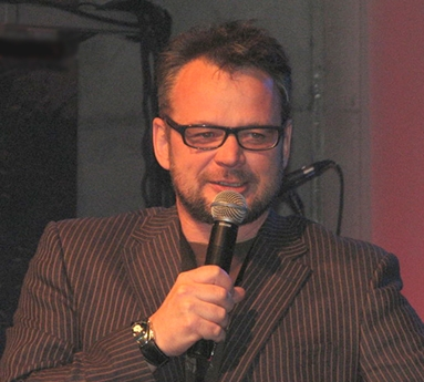 Piotr Bałtroczyk